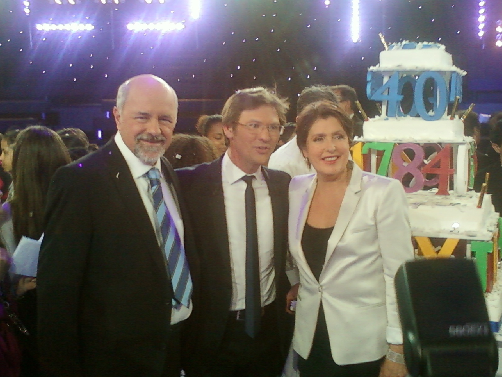 Bertrand Renard, Laurent Romejko et Arielle Boulin-Prat lors de l'émission spéciale « 40 ans » des Chiffres et des lettres diffusée le lundi 19 mars 2012 sur France 3.